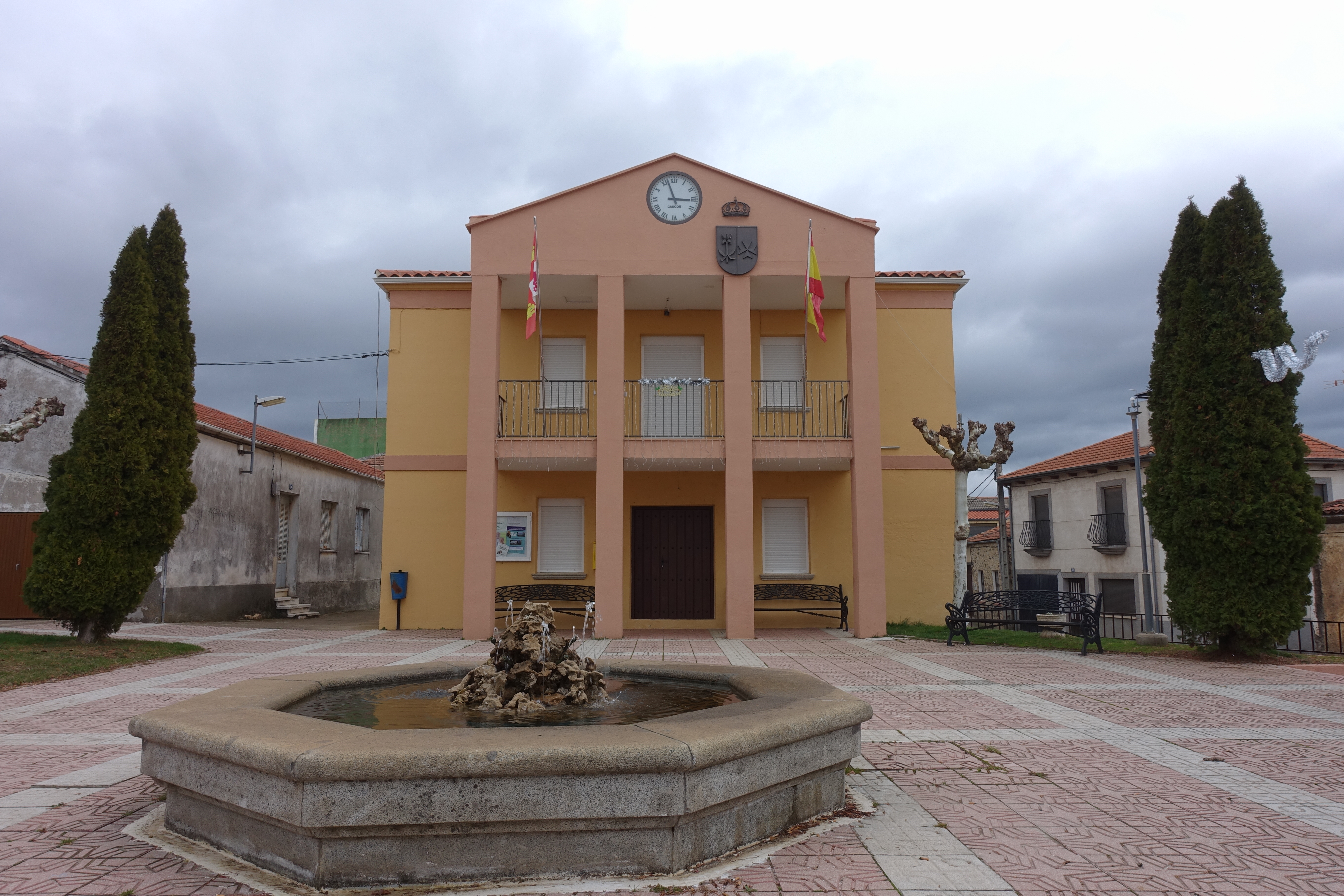 Casa consistorial de Villasrubias (Salamanca, España).